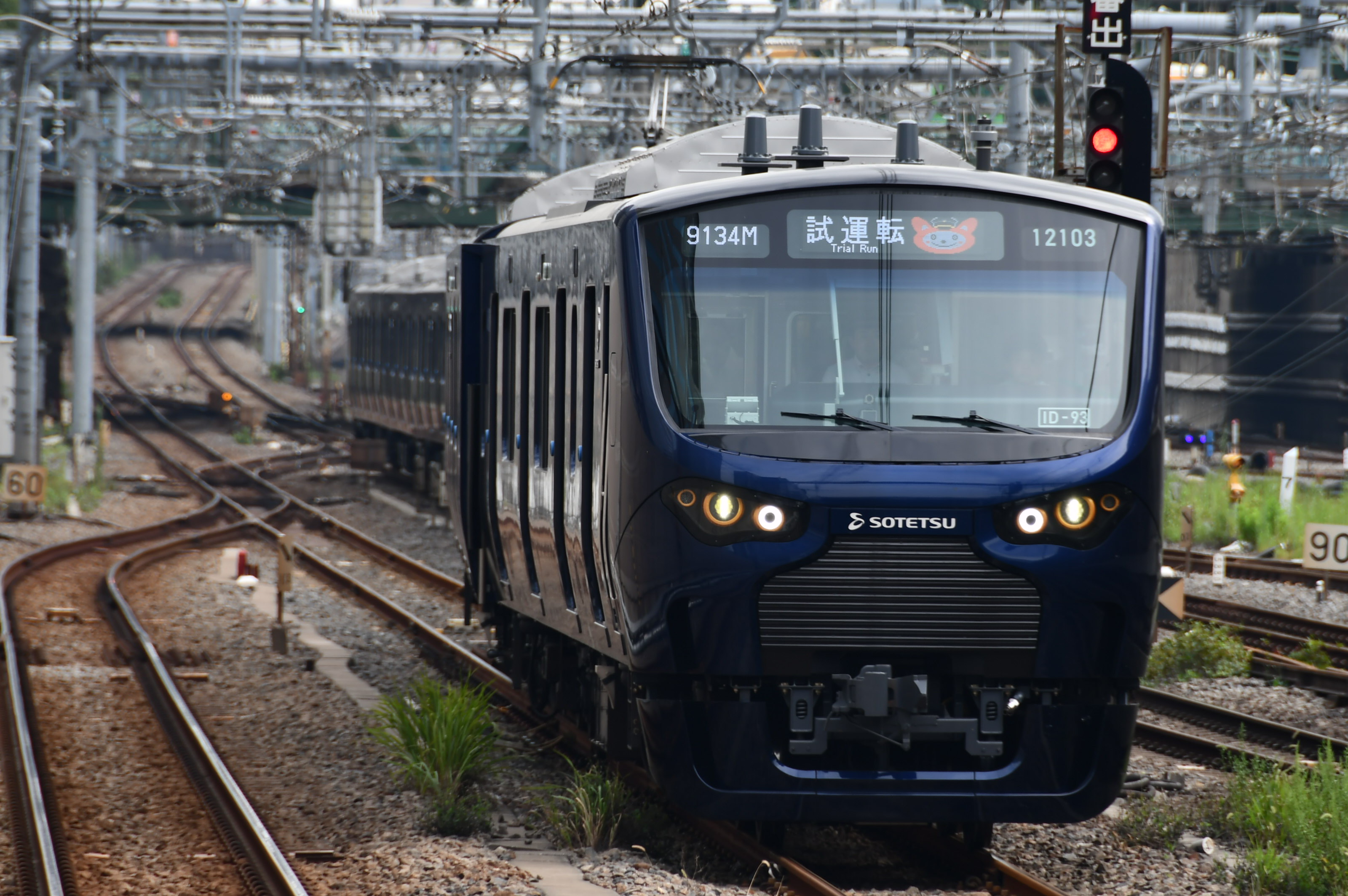 12000系が品川駅に入線する様子。